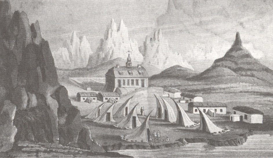 Lichtenfels/Greenland (David Cranz)